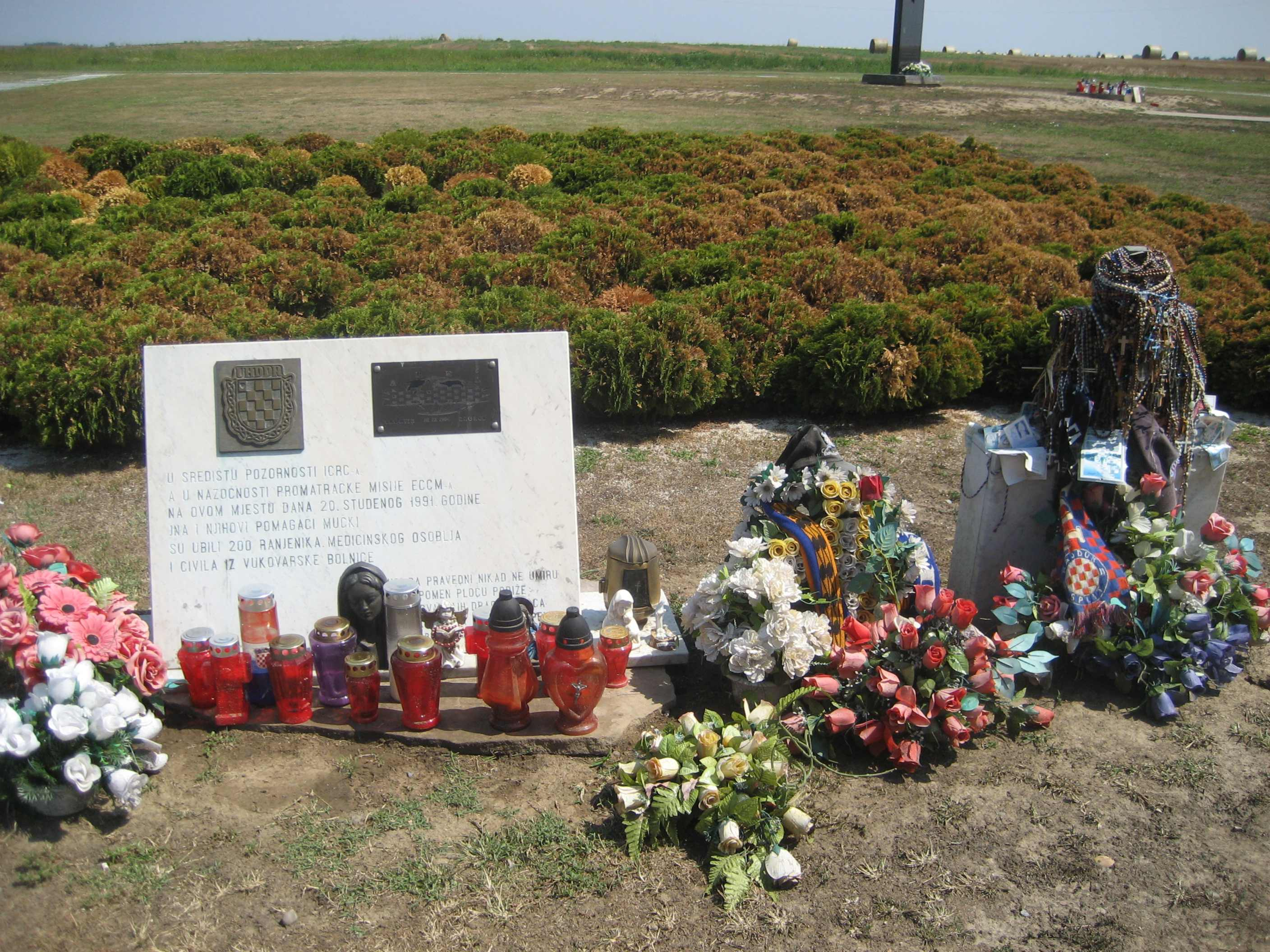 Ovcara Massacre Moemorial 4